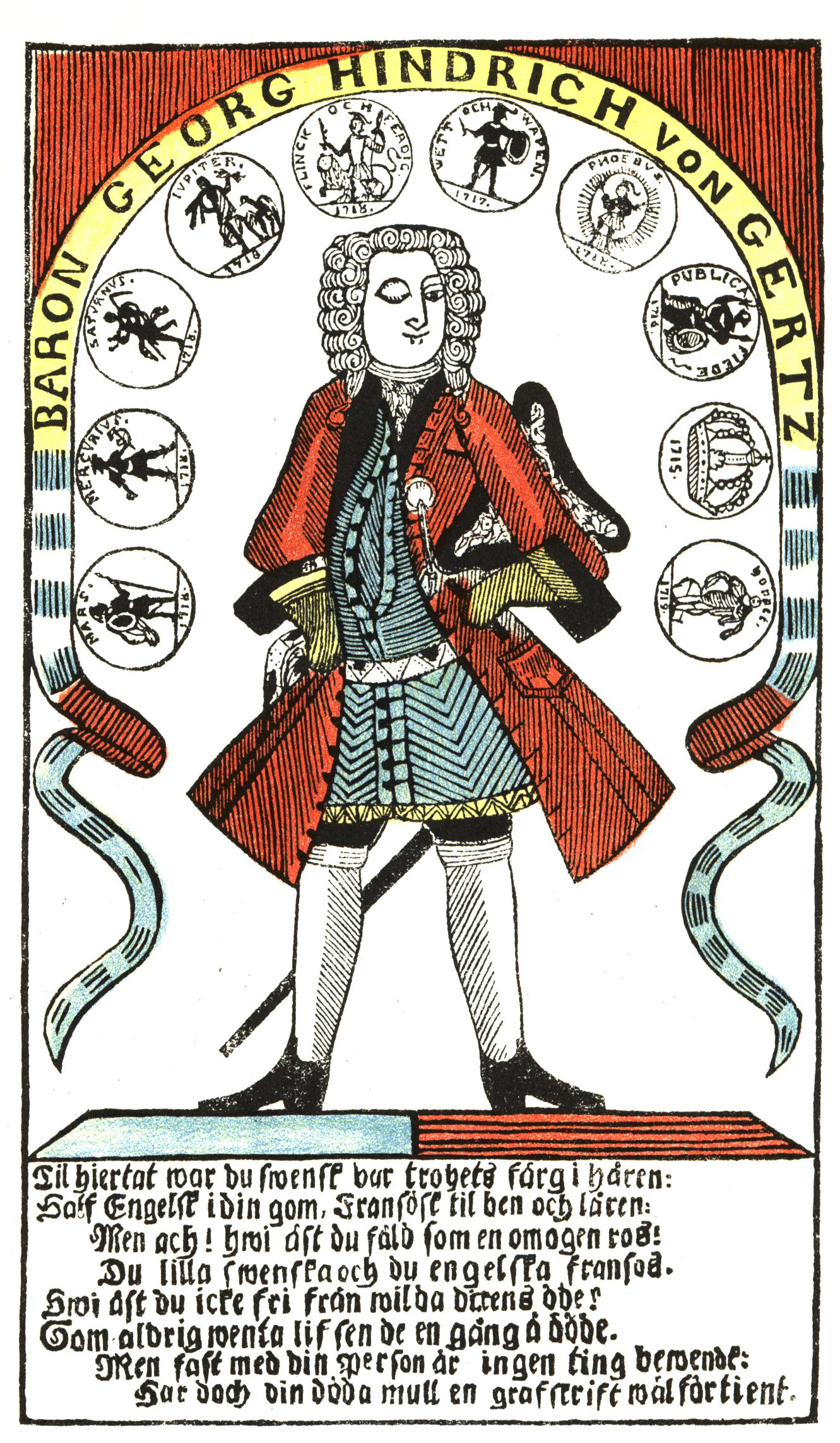 Hand bill depicting Georg Heinrich von Görtz (1668-1719)